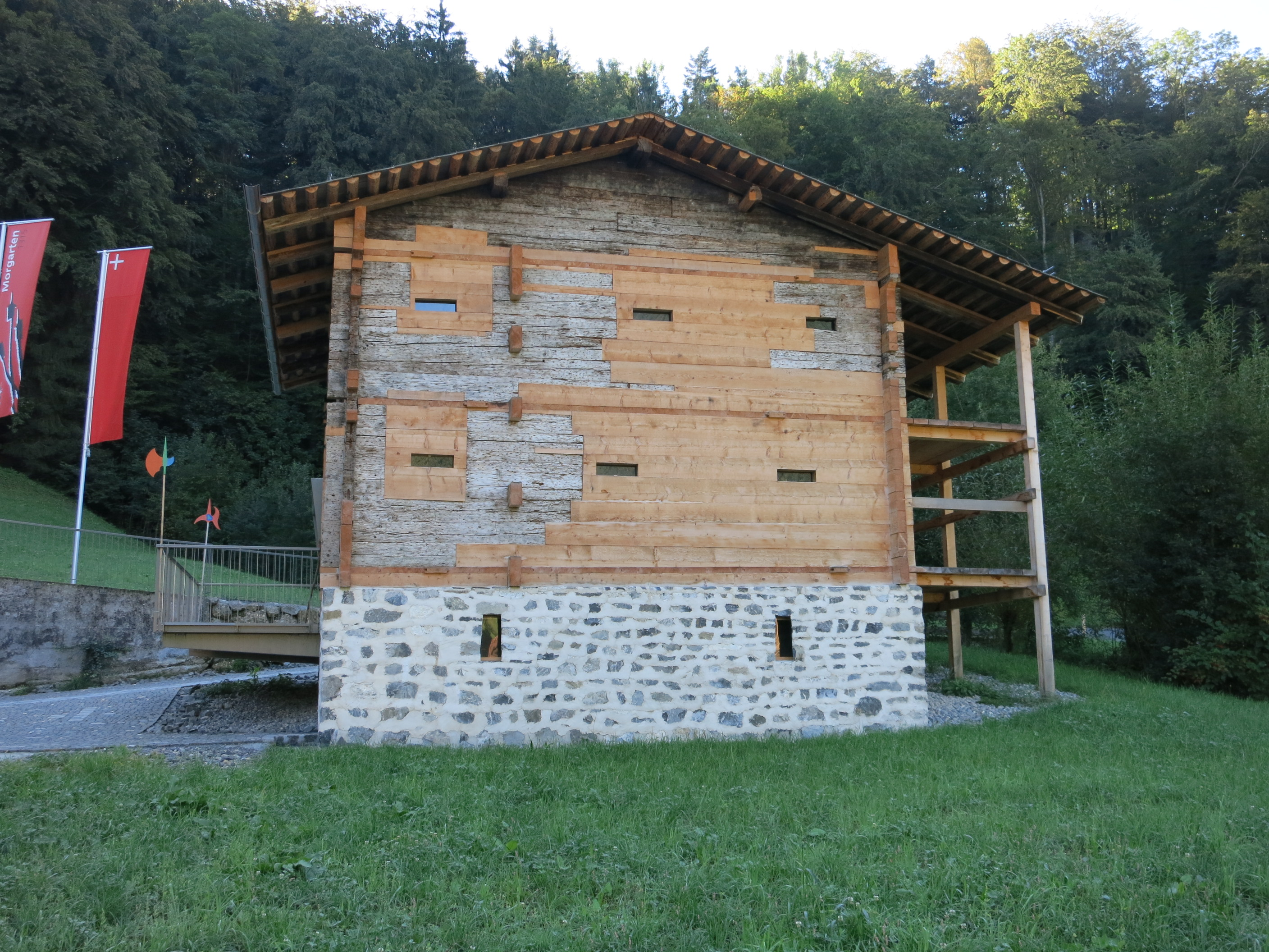 Wohnhaus, Schornen, Sattel SZ, Schweiz